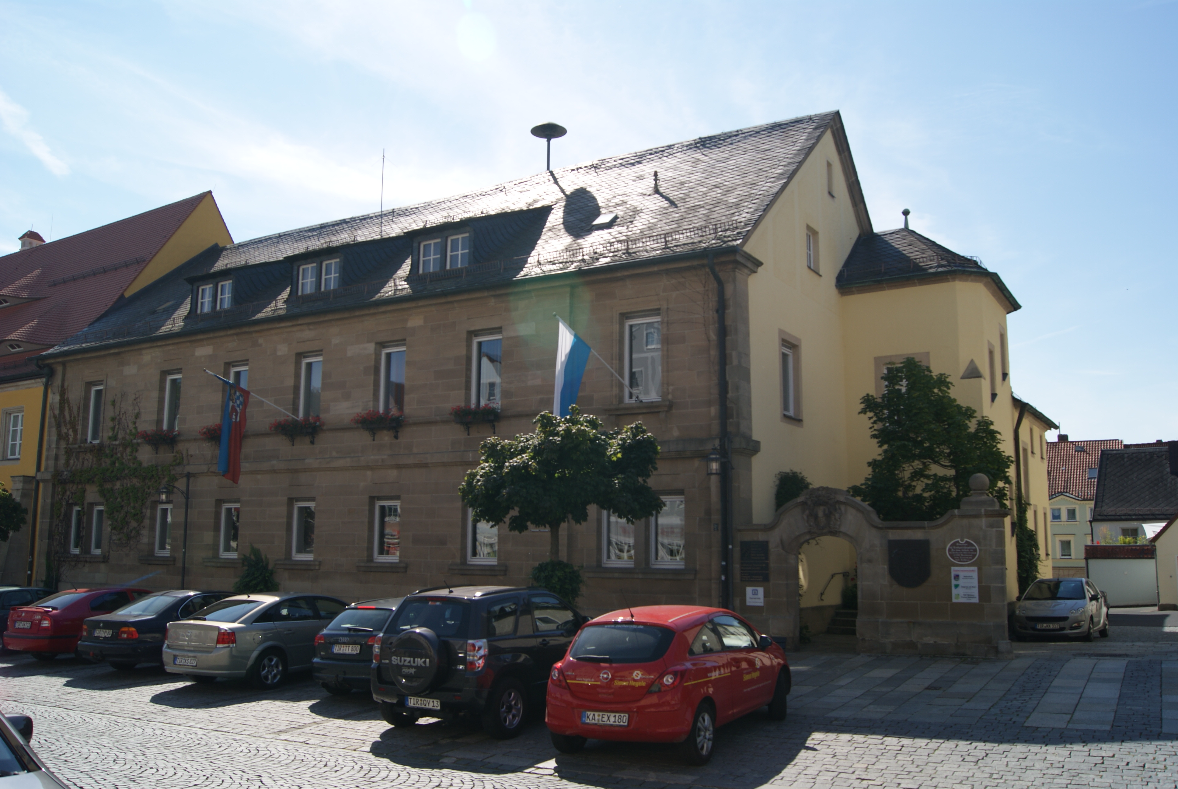 Stadtplatz 38, Rathaus, ehemaliges Bezirksamtsgebäude, 1823 erbaut, um 1900 überformtThis is a photograph of an architectural monument.